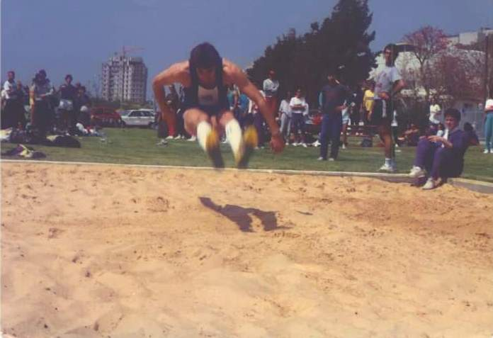 פרדי נעים.